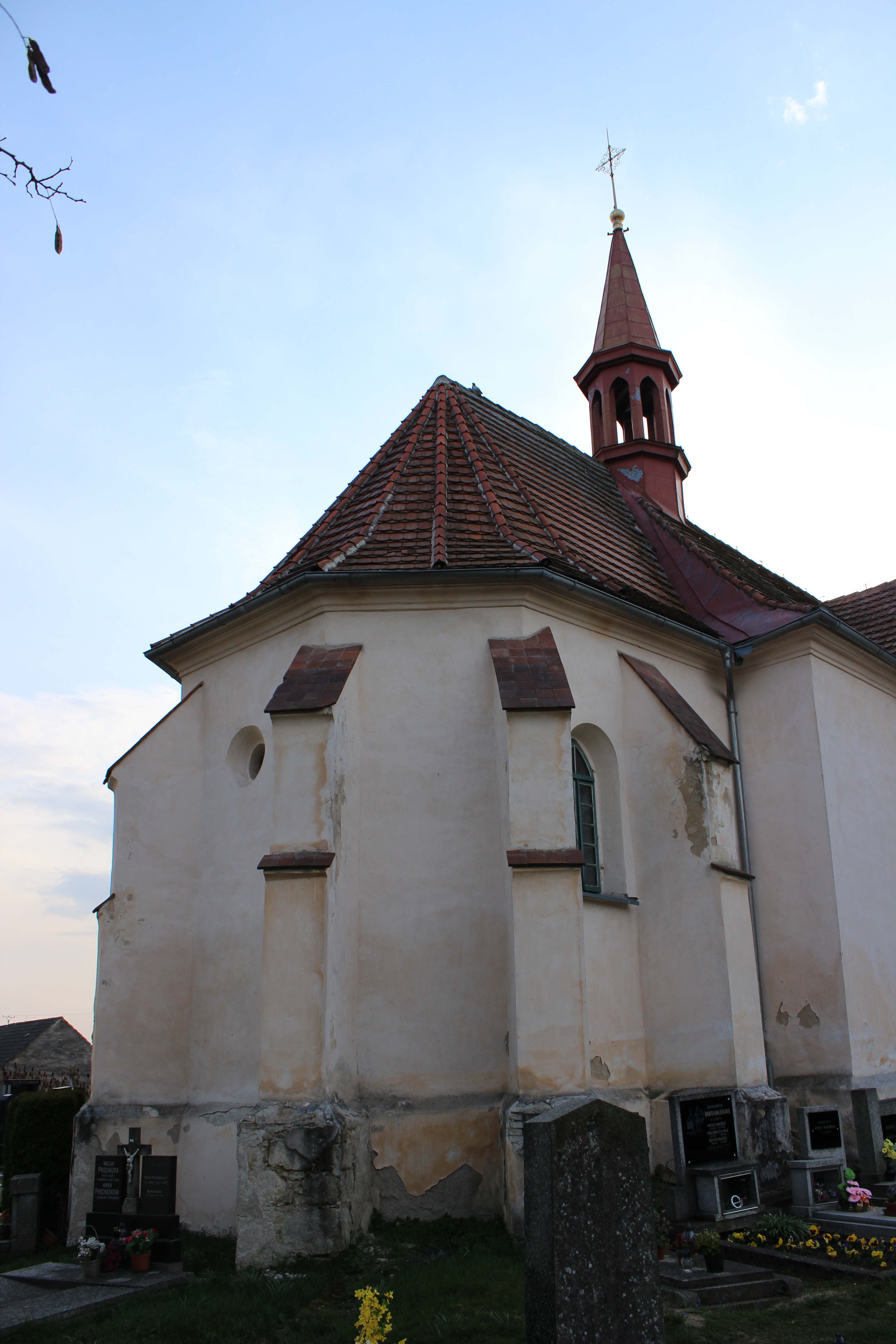 Kostel svatého Jakuba Většího v Kadlíně. This photograph was taken with a Canon EOS 600D.